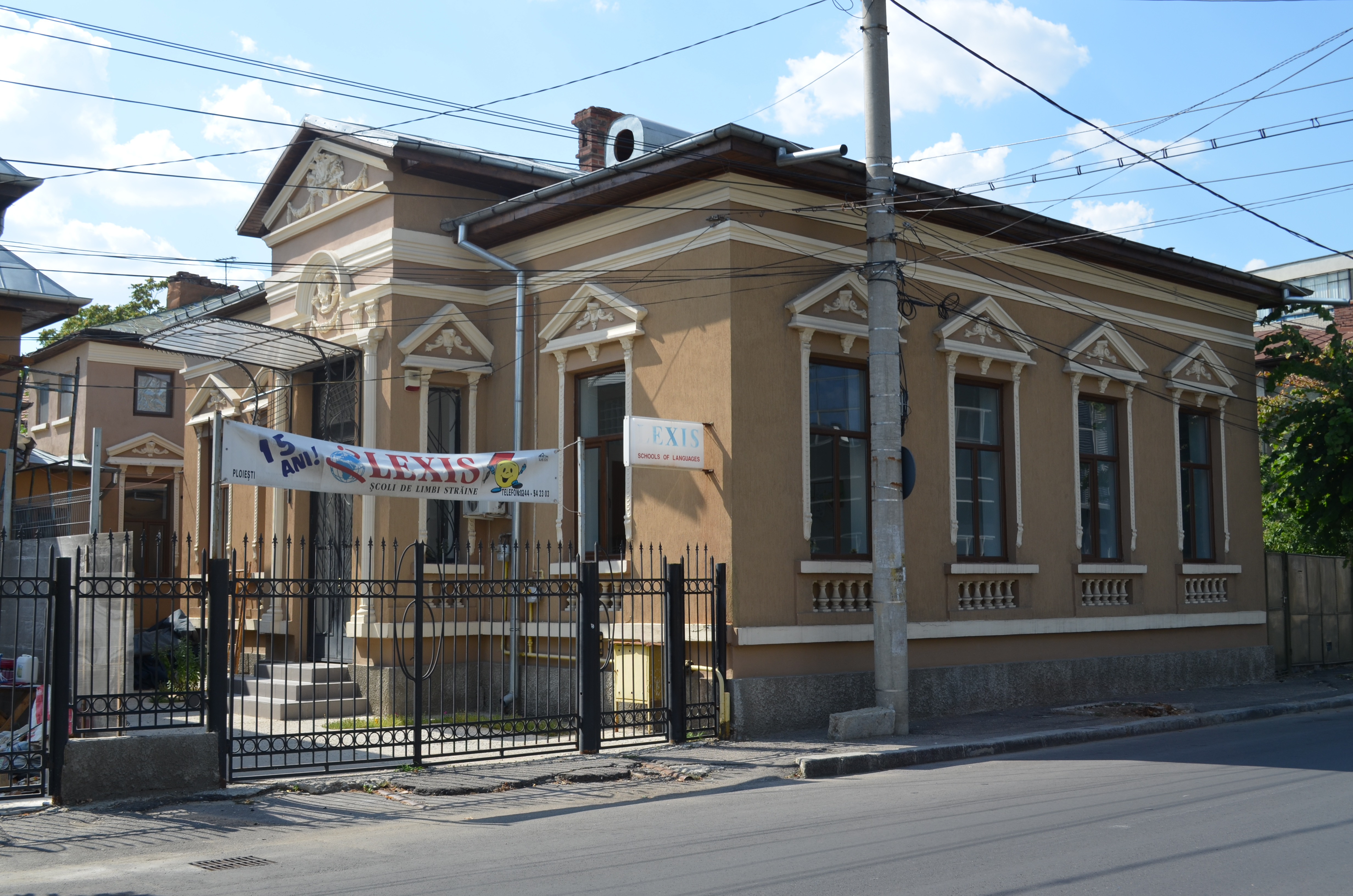 Casa Romulus Filipescu, Str. Democrației nr. 24, Ploiești